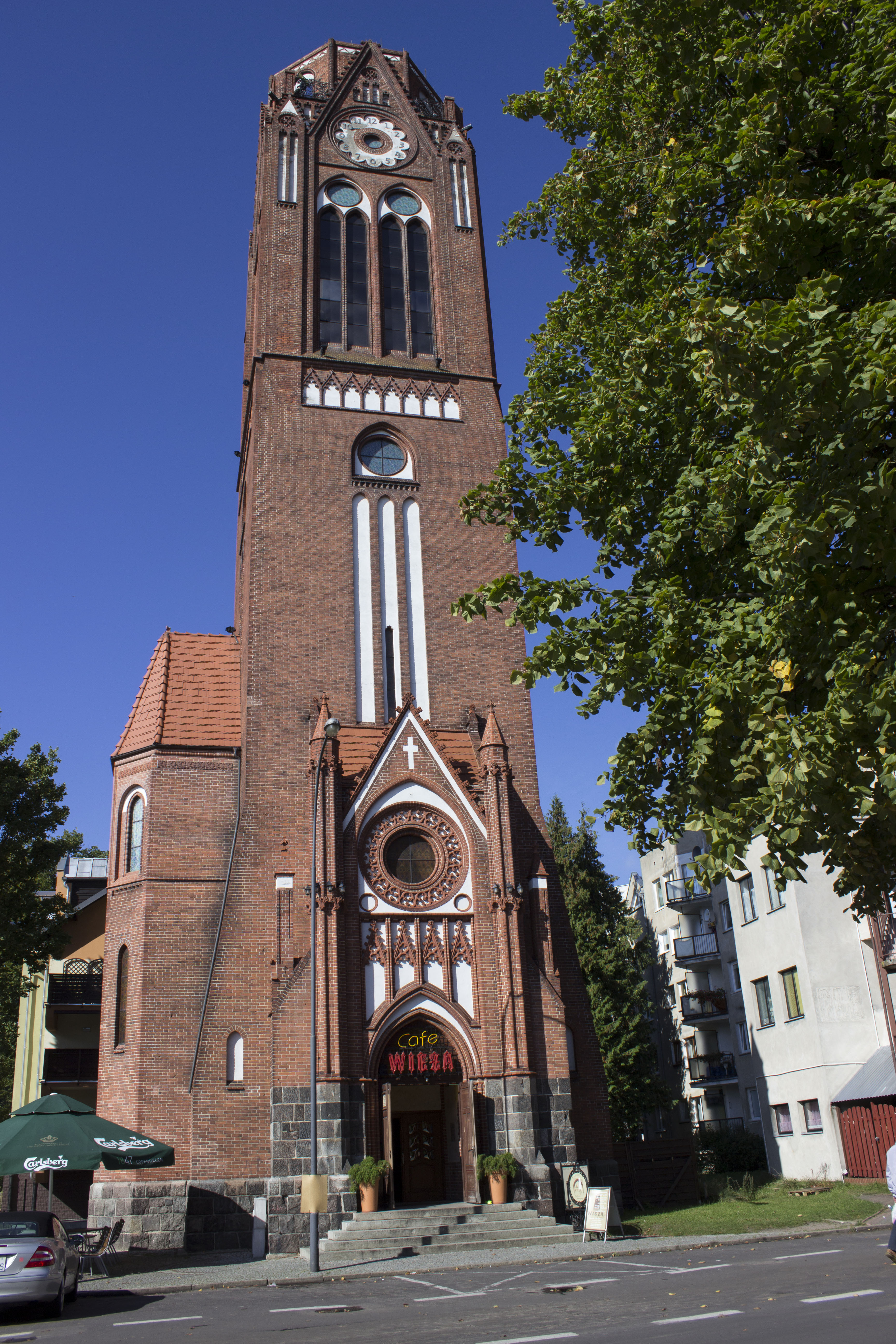 Świnoujście, wieża kościoła luterańskiego, 1904